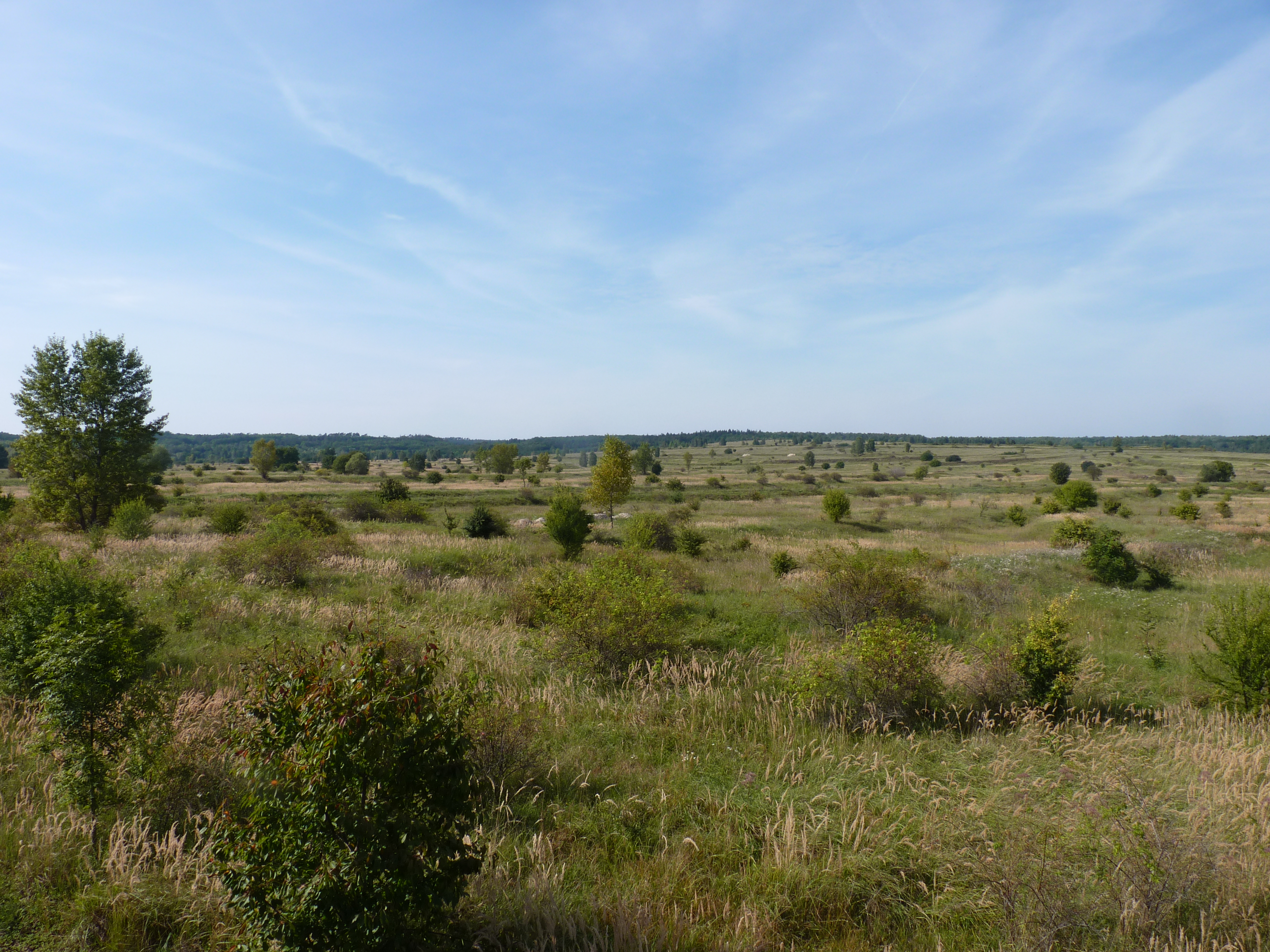 Přírodní rezervace Pod Benáteckým vrchem v létě 2011.